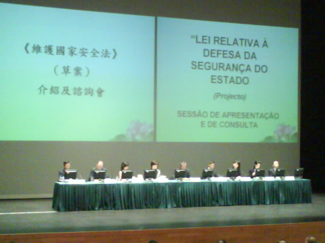 Consulta da Lei relative à defesa da segurança do Estado projecto